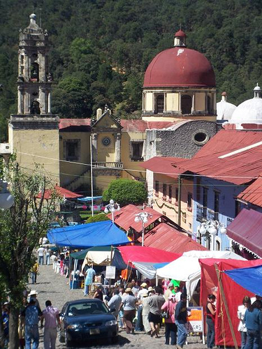 Los viajes de Semana Santa en donde uno (o la familia de uno) agarra el cochesito y recorre los pueblos aledaños. Mineral del chico uno de los más pintorescos